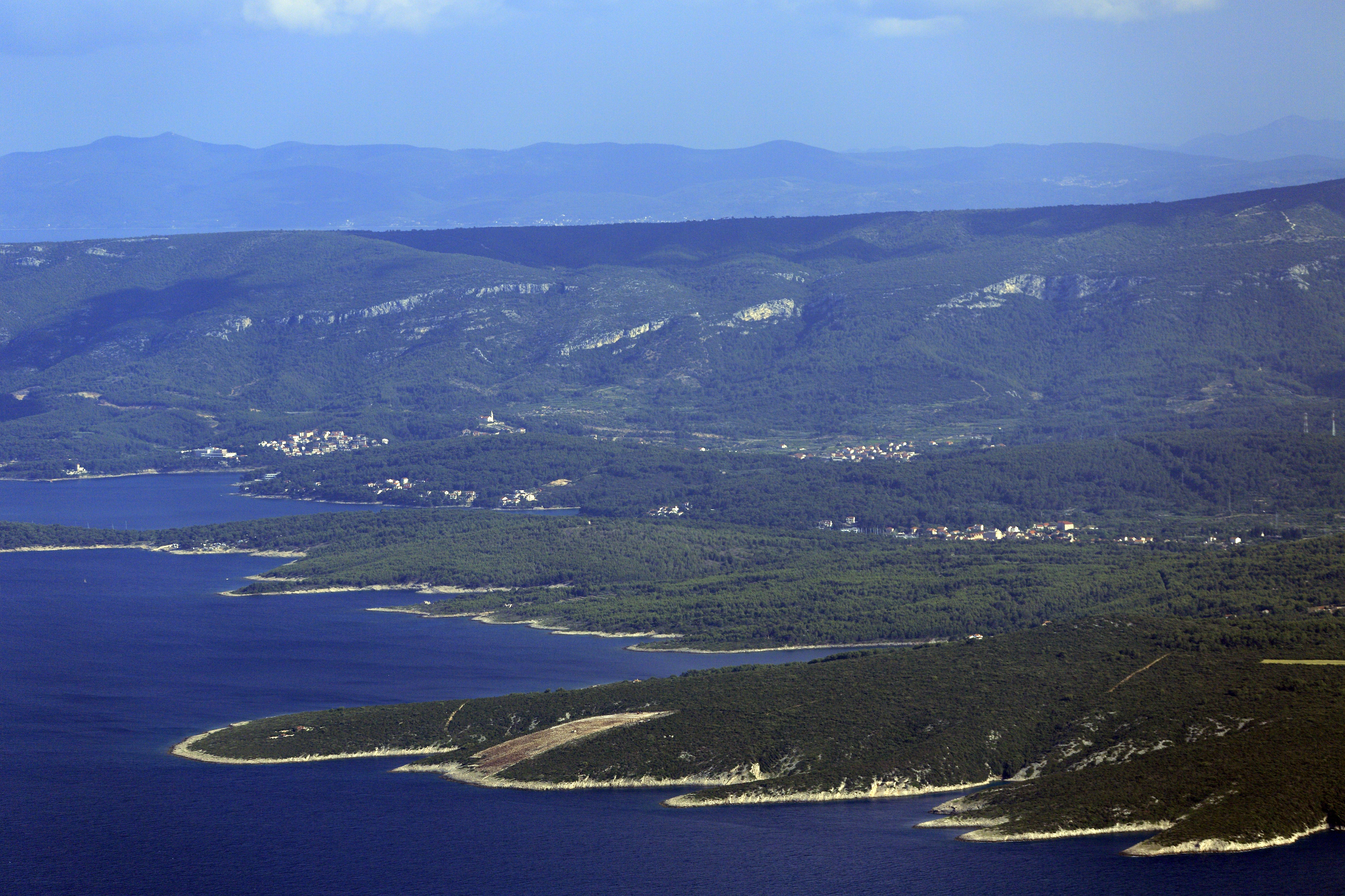 Nordostküste vom Gipfel Vidova Gora auf Brač, die Ortschaften sind Jelsa, Pitve und Vrboska.